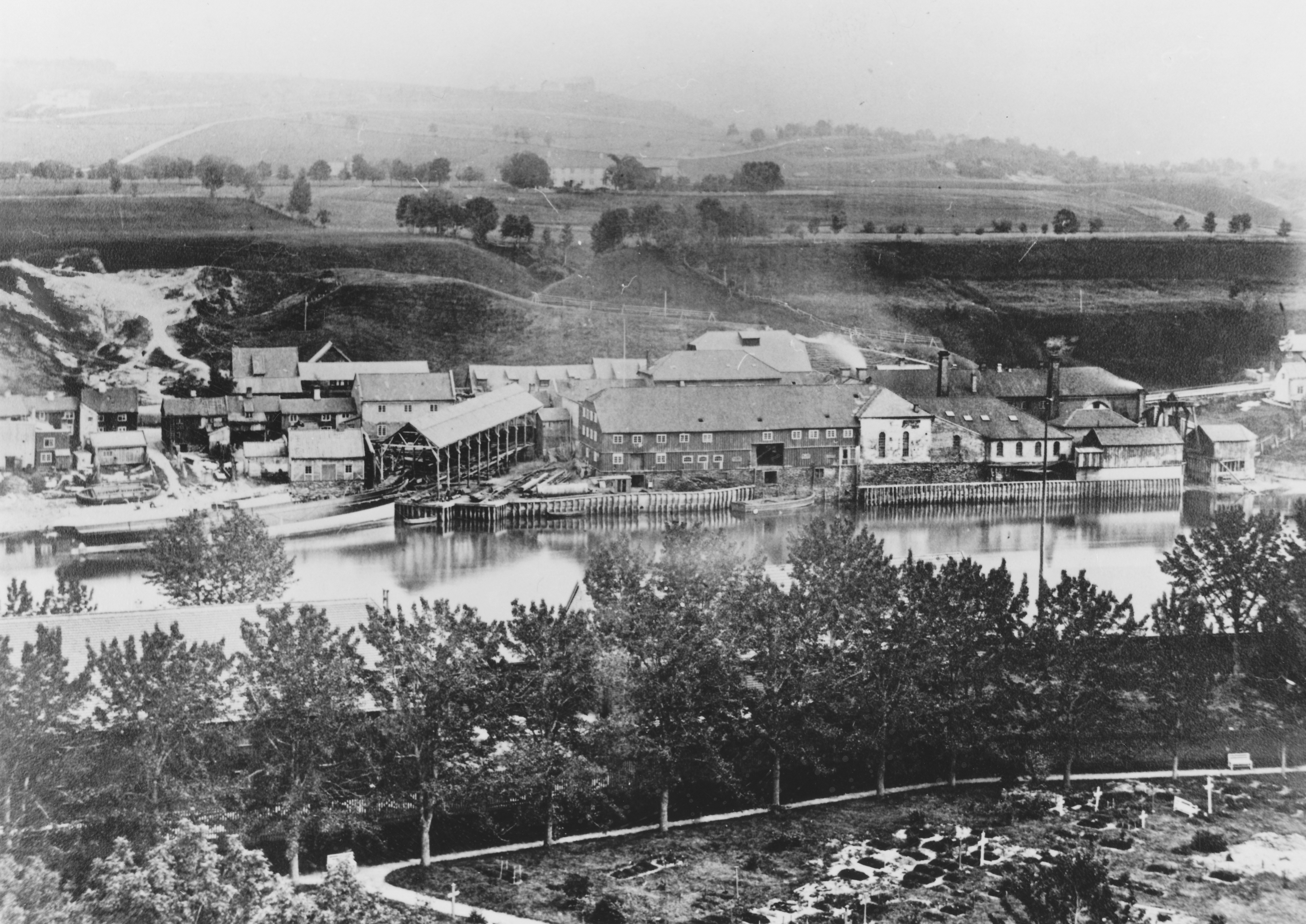 Fabriken ved Nidelven var en tidligere industribedrift på den nåværende eiendommen Øvre Bakklandet 4. Dette var Trondheims første egentlige industribedrift, grunnlagt i 1843. I forgrunnen ser man litt av Domkirkegården. Fabriken ved Nidelven bygde 1849 - 1850 Norges første norskproduserte dampskip "Nidelven" og det første norskproduserte lokomotivet "Thrønderen" 1860 - 1861. I 1872 ble Fabriken ved Nidelven slått sammen med Trolla Brug og dannet Trondhjems Mekaniske Værksted. Les mer om historien til Fabriken ved Nidelven her: Sandvik, Pål Thonstad: Mekanisk Industri i en europeisk periferi. Fabrikken ved Nidelven 1843-76 (Oslo 1994) Foto: Charles Foss. Ukjent år.